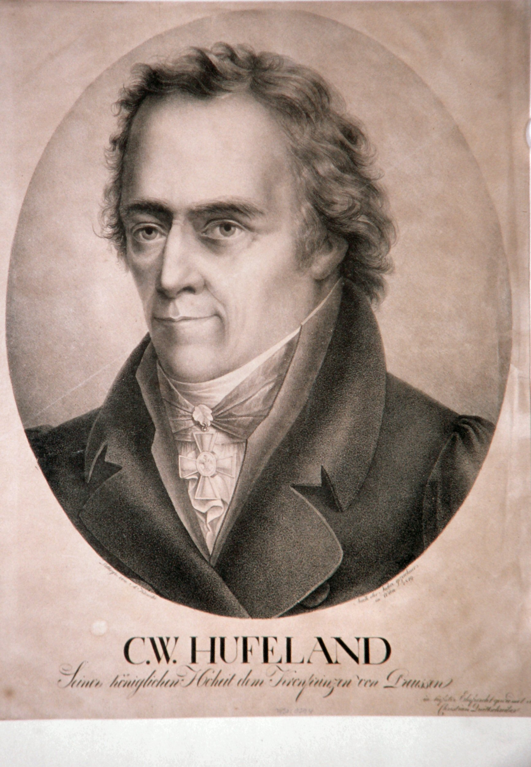 Christoph Wilhelm Hufeland, Lithographie von Adolph Friedrich Kunike, 1819